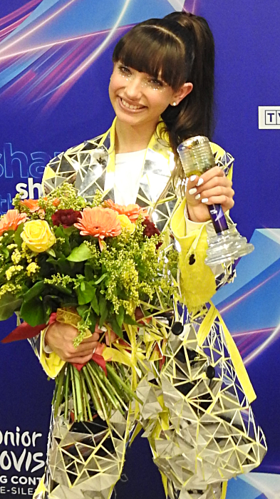 Polska piosenkarka Viki Gabor po finale Konkursu Piosenki Eurowizji dla Dzieci 2019.